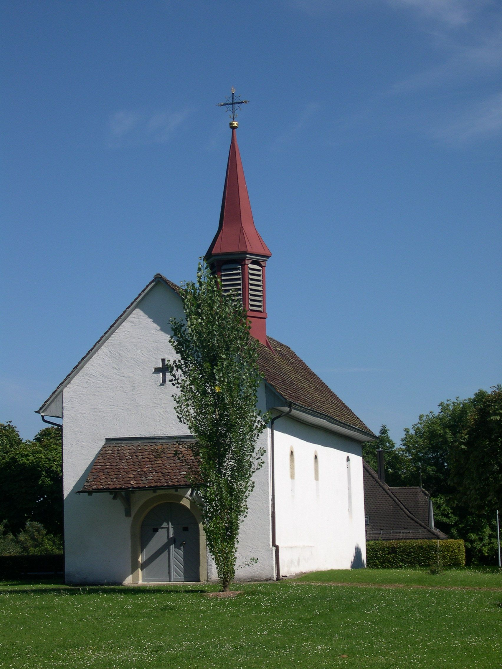 St.Verena und Mauritius Kapelle auf Burg (Kirchlibuck)